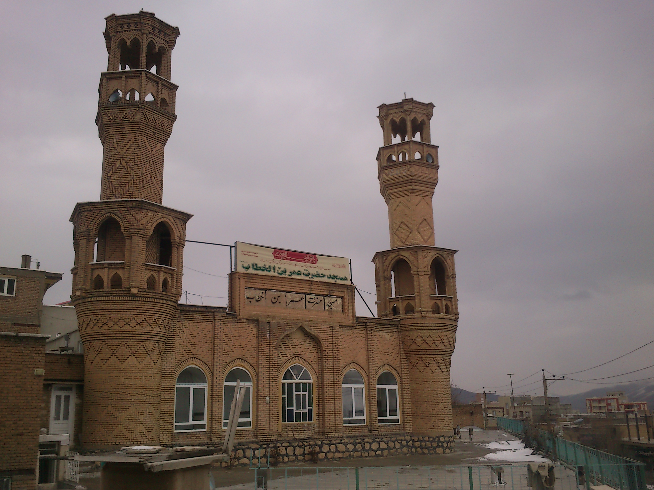 مسجد عمربن خطاب سقز